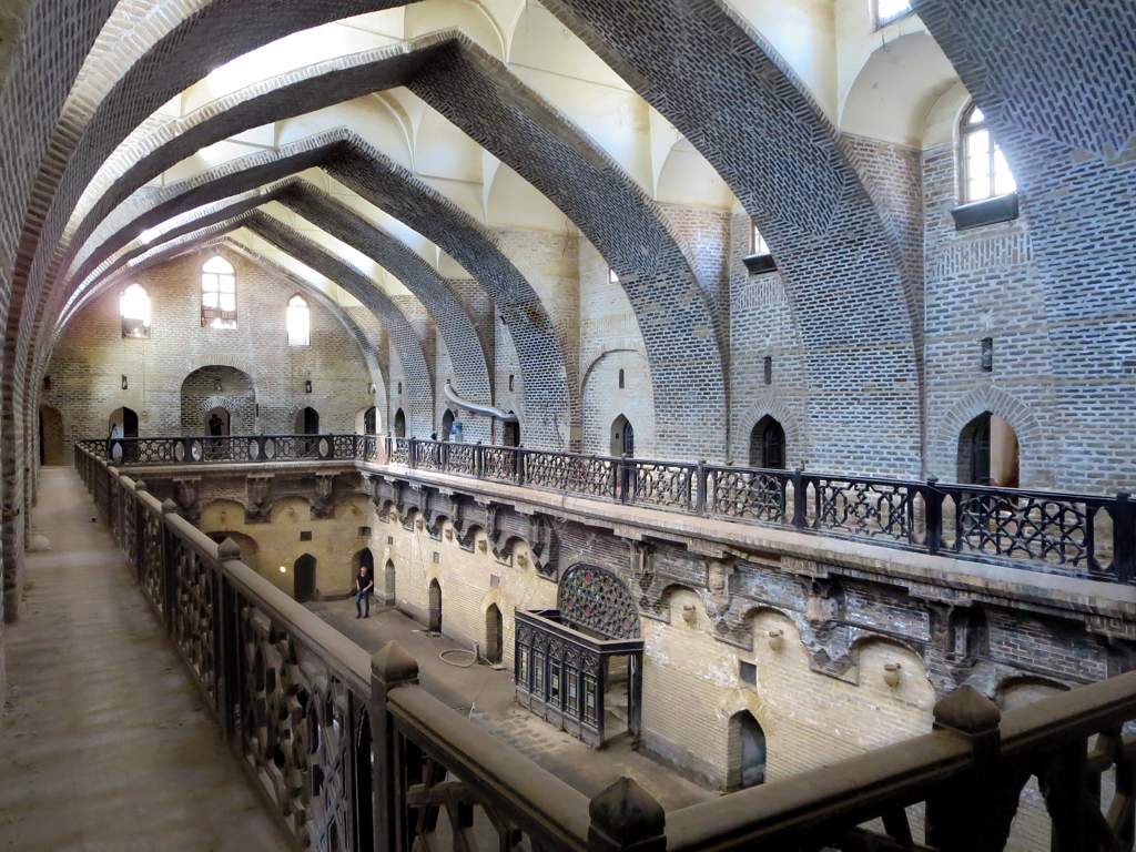 صورة لخان مرجان في بغداد